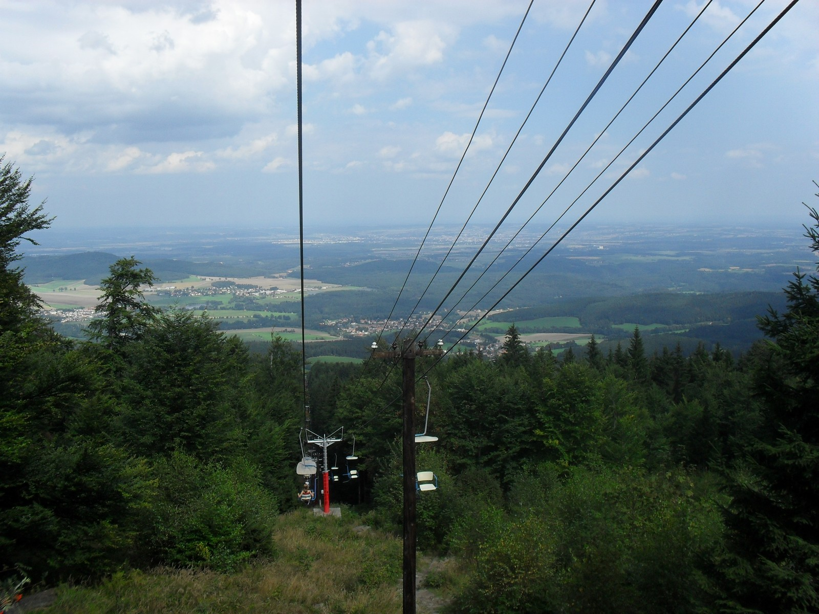 Fotky z mého výletu na Šumavskou Kleť